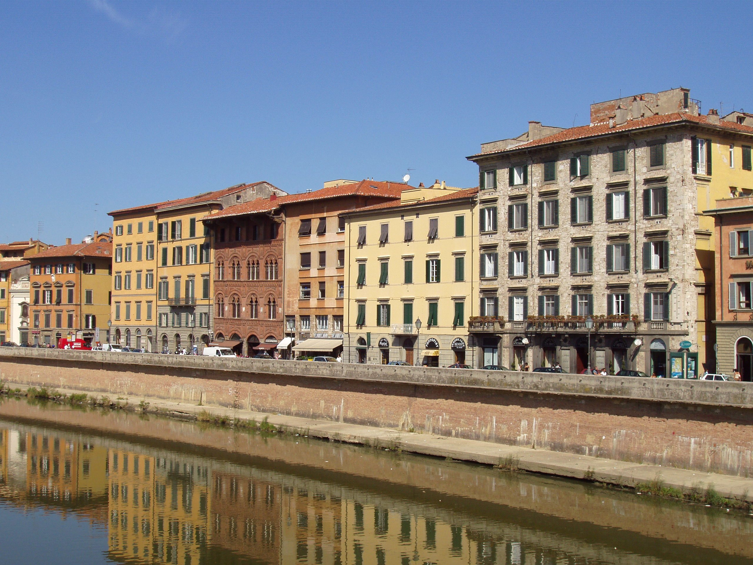 Lungarno, Pisa - buildings. Pisa, Italy.